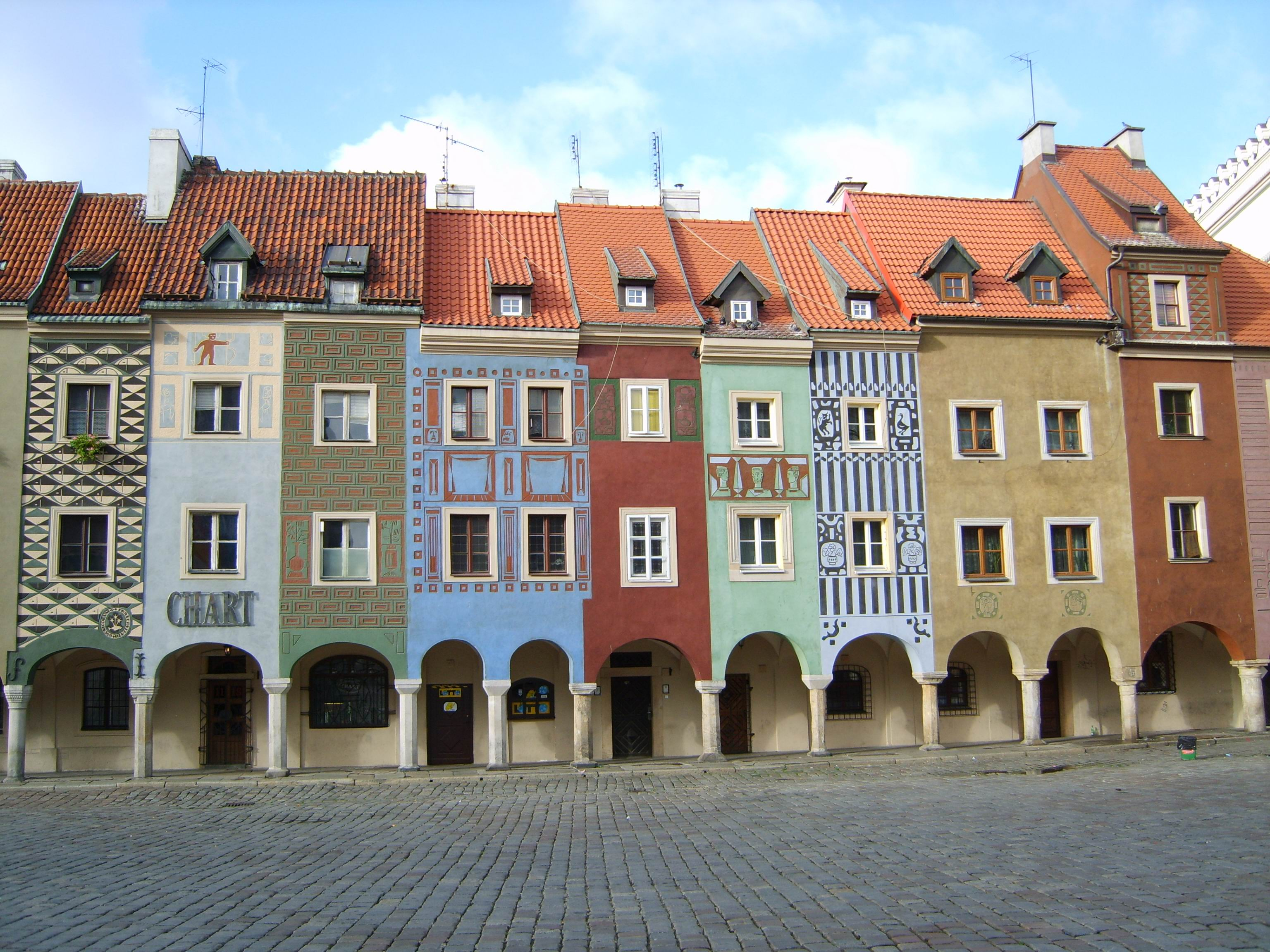 Poznań - domki budnicze w zespole urbanistyczno-architektonicznym Starego Rynku (zabytek nr A 195)